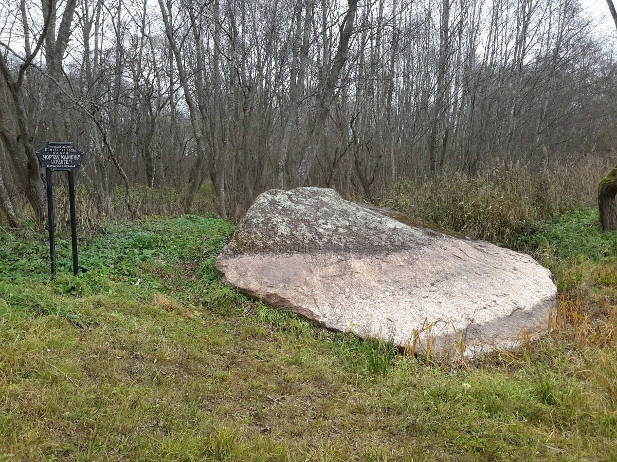 Вароніна. Чортаў камень (Кравец)